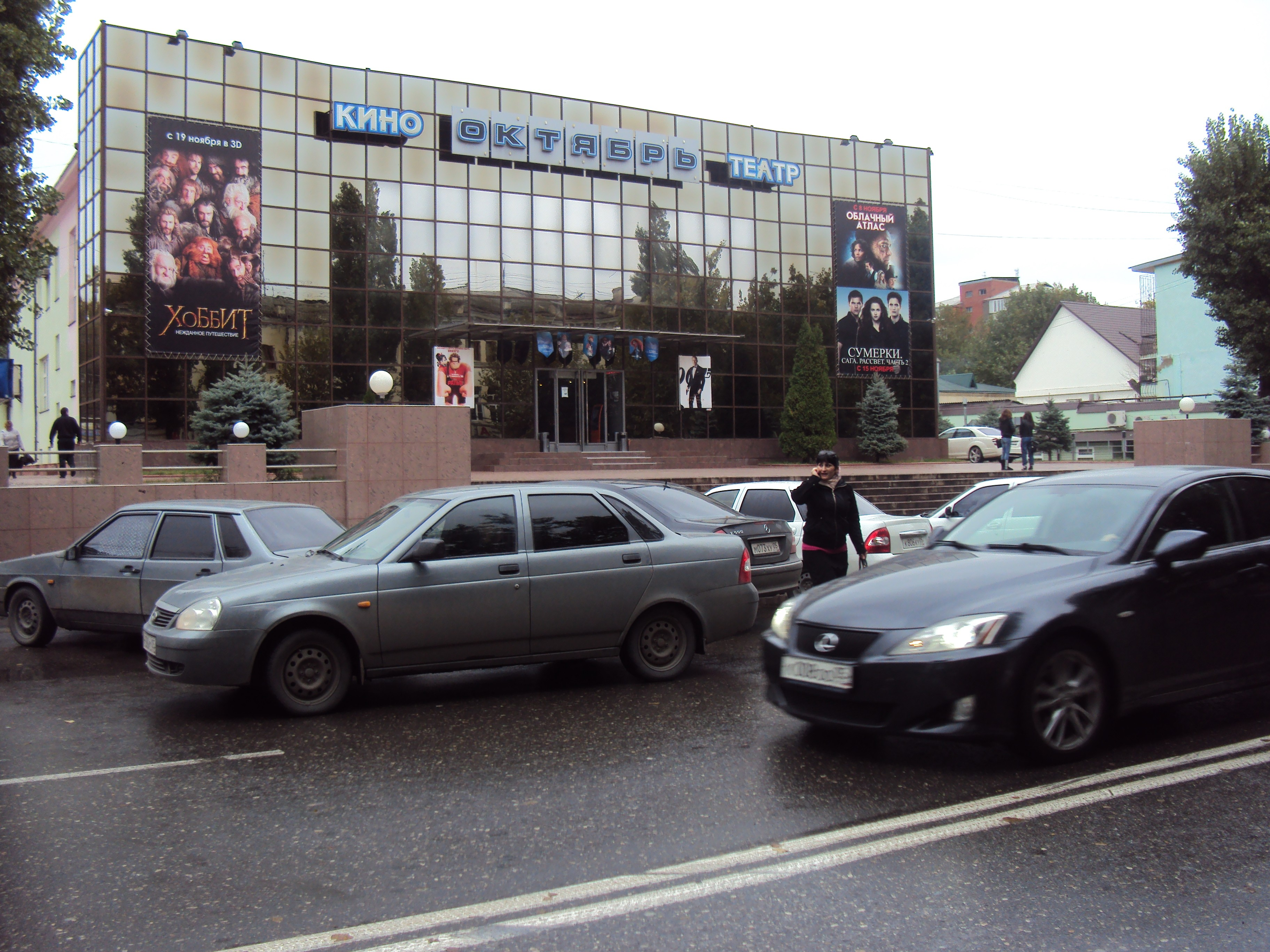 Кинотеатр Октябрь в Махачкале